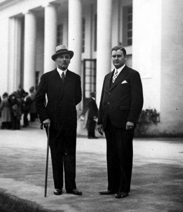 Wizyta ministra pełnomocnego RP przy rządzie USA Tytusa Filipowicza na Powszechnej Wystawie Krajowej w Poznaniu. Na zdjęciu widoczni: minister Tytus Filipowicz (w kapeluszu) i Florian Piskorski.